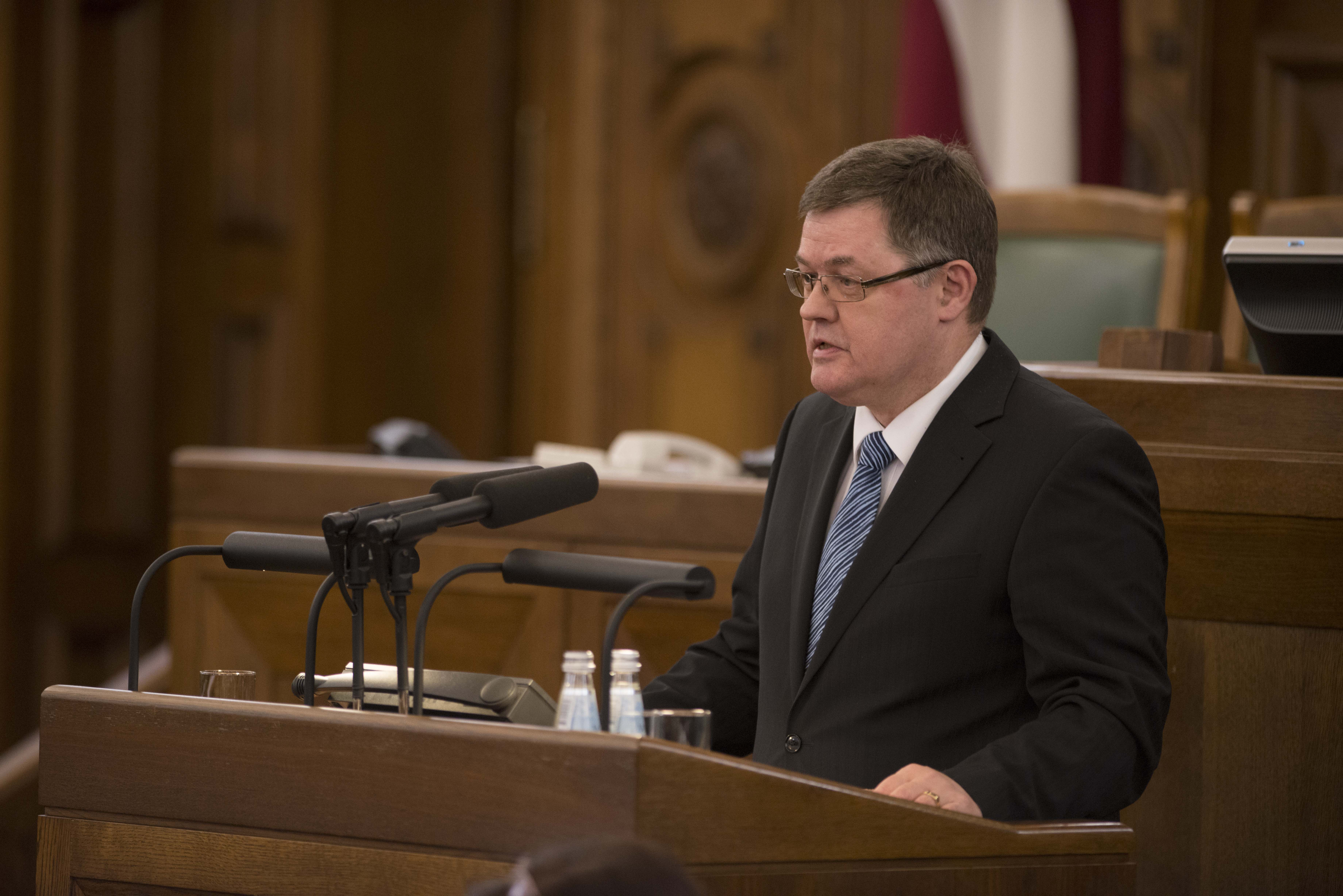 2014.gada 4.novembris. Deputāts Kārlis Seržants dod svinīgo solījumu. Foto: Juris Vīgulis, Saeimas Kanceleja Izmantošanas noteikumi: saeima.lv/lv/autortiesibas